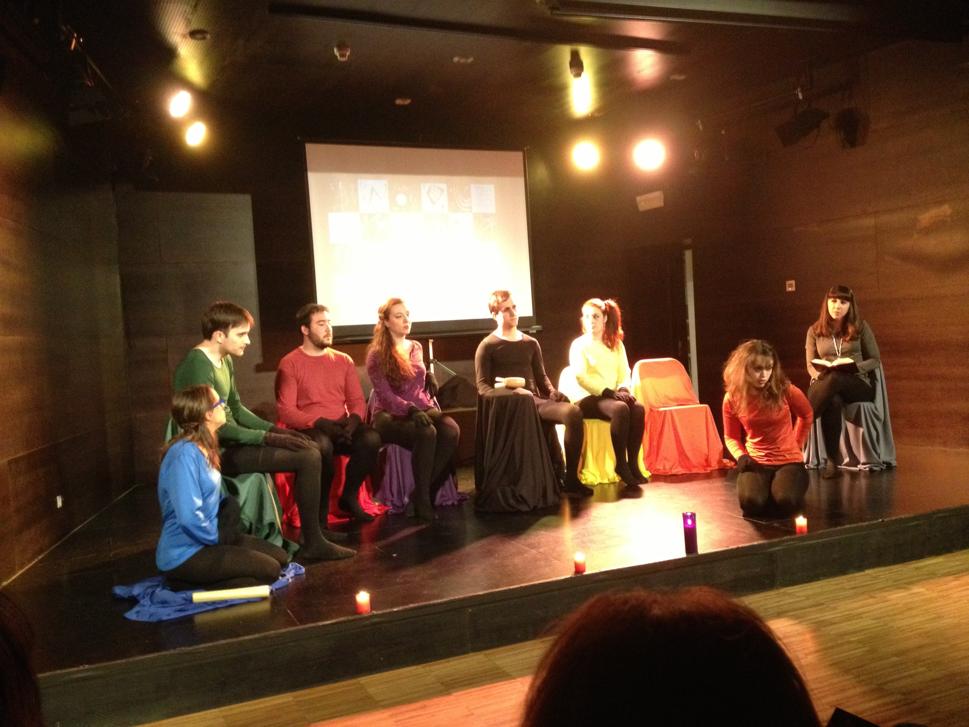 Montaje de la compañía TECU Teatro en el marco del Festival MITEU de 2014 en el Auditorio Municipal de Ourense.